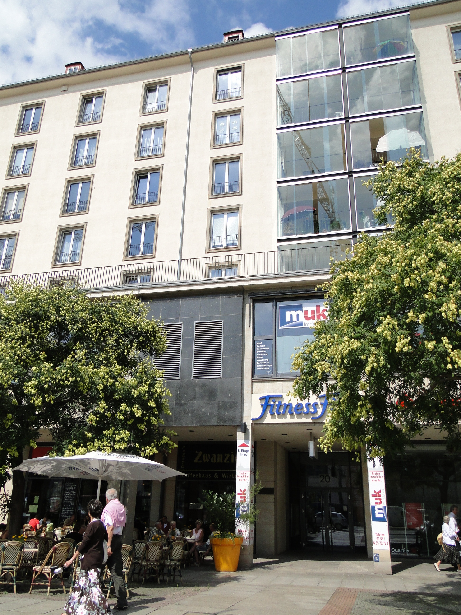 Haus Wilsdruffer Straße 20 in Dresden, Standort des früheren Bankhauses Kaskel, dem Vorgänger der Dresdner Bank